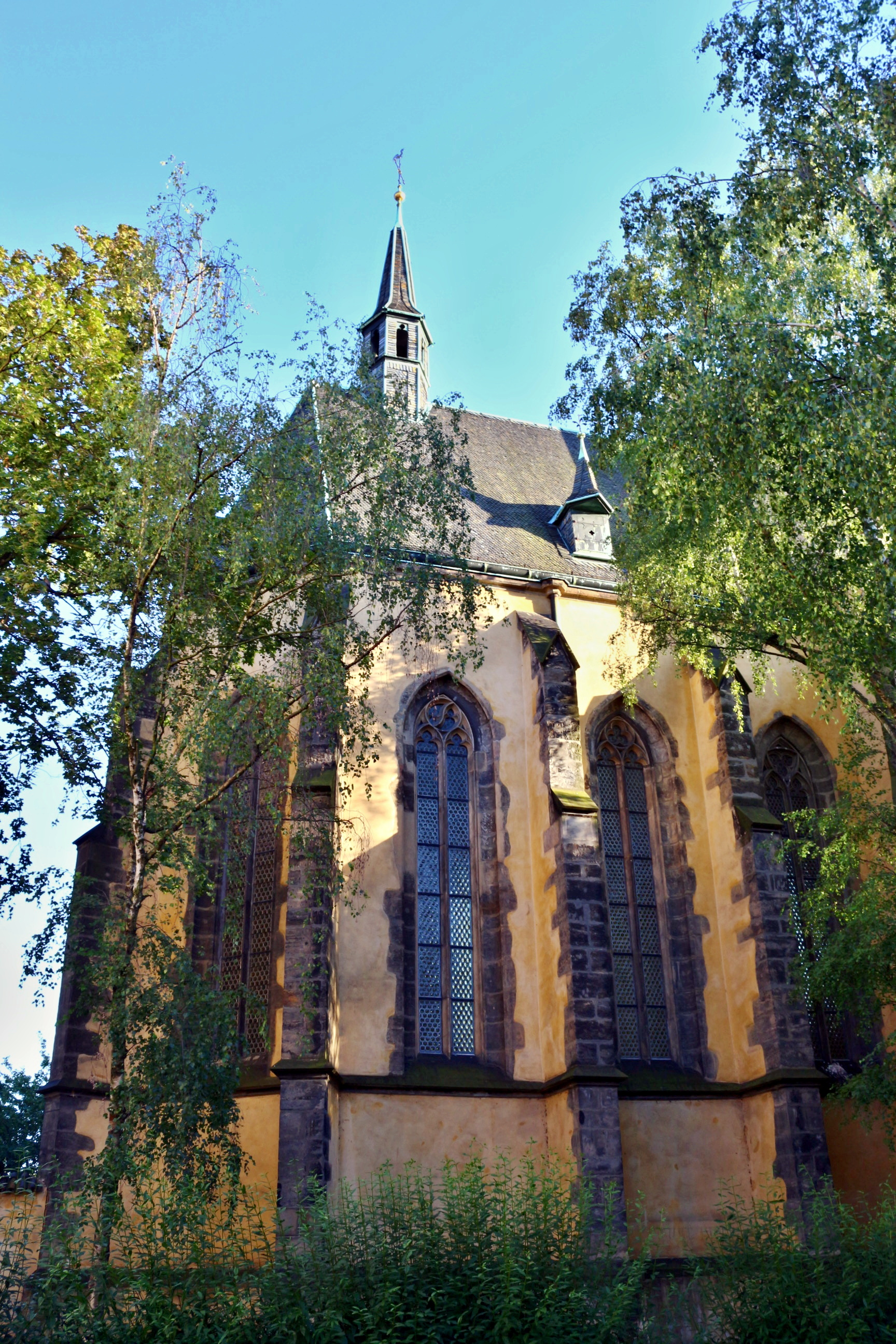 Kostel svatého Apolináře v Praze